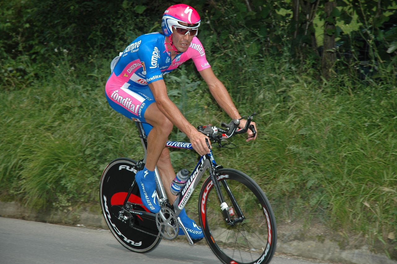 Paolo Fornaciari, Euskal Bizikleta 2007